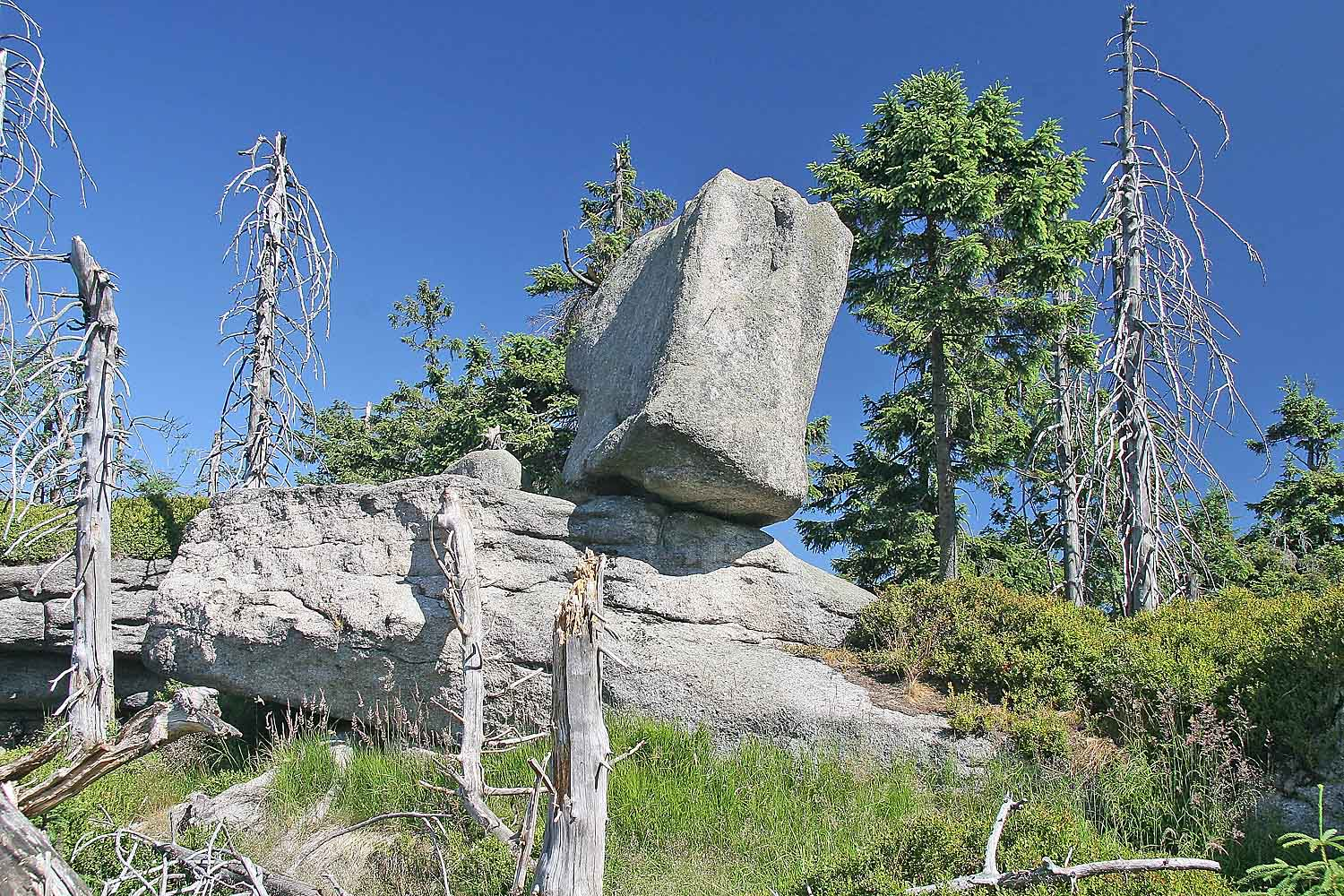 Skalní útvar Čertův odpočinek, Jizera Mountains, district Liberec, Czech Republic autor: Prazak date: 19. 7. 2006